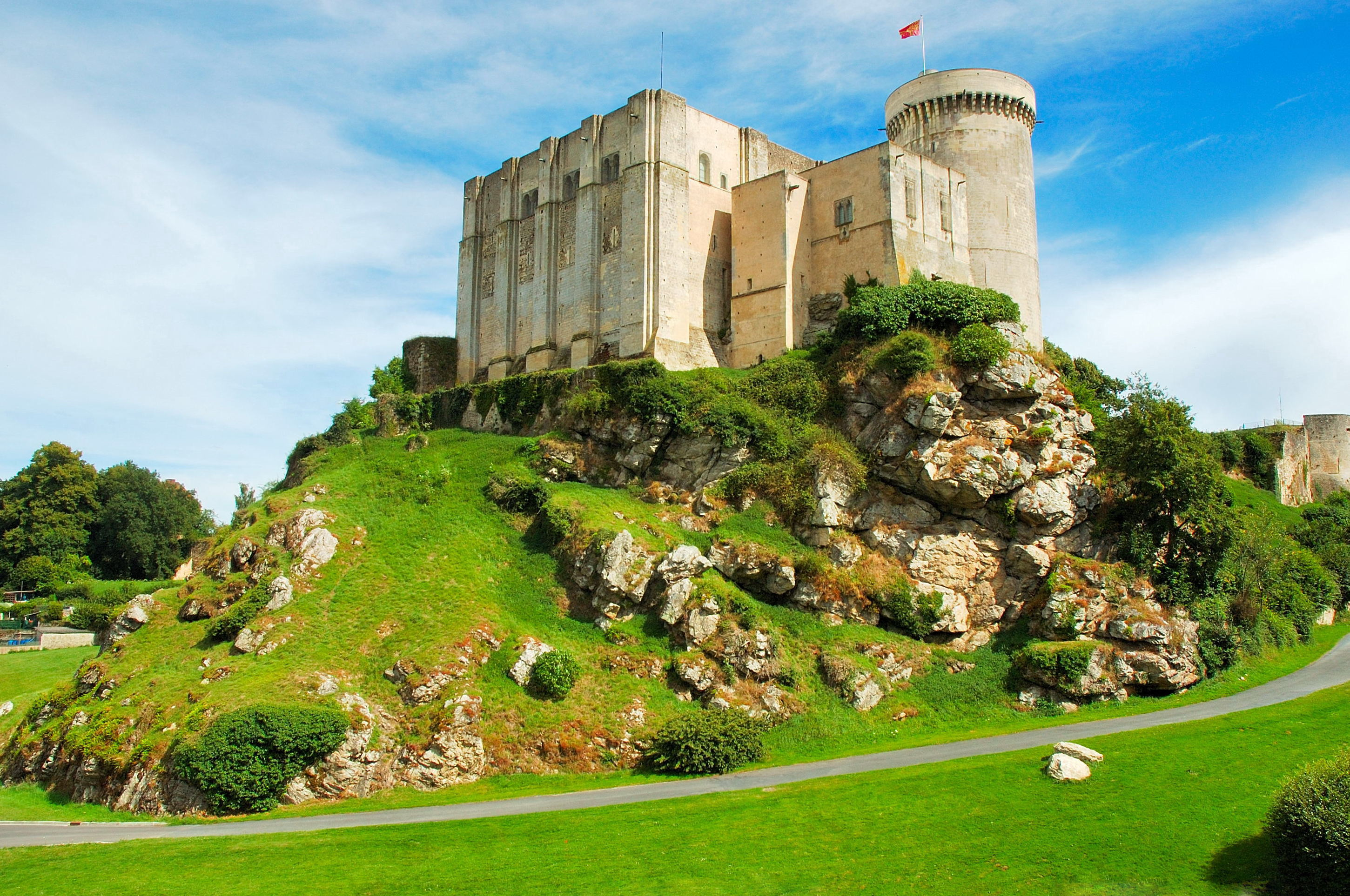 Château-fort de Falaise (2008) - De gauche à droite les grand et petit donjons et la haute tour Talbot.